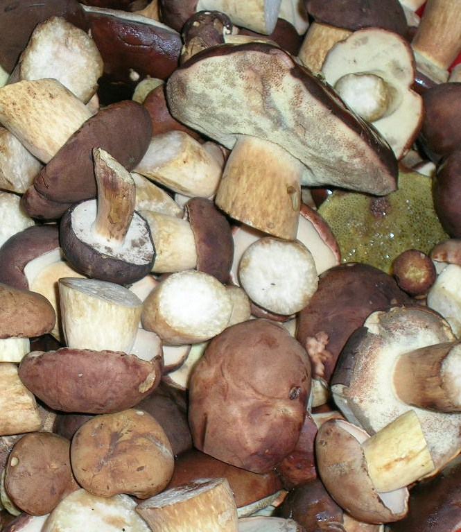 Maronenröhrlinge